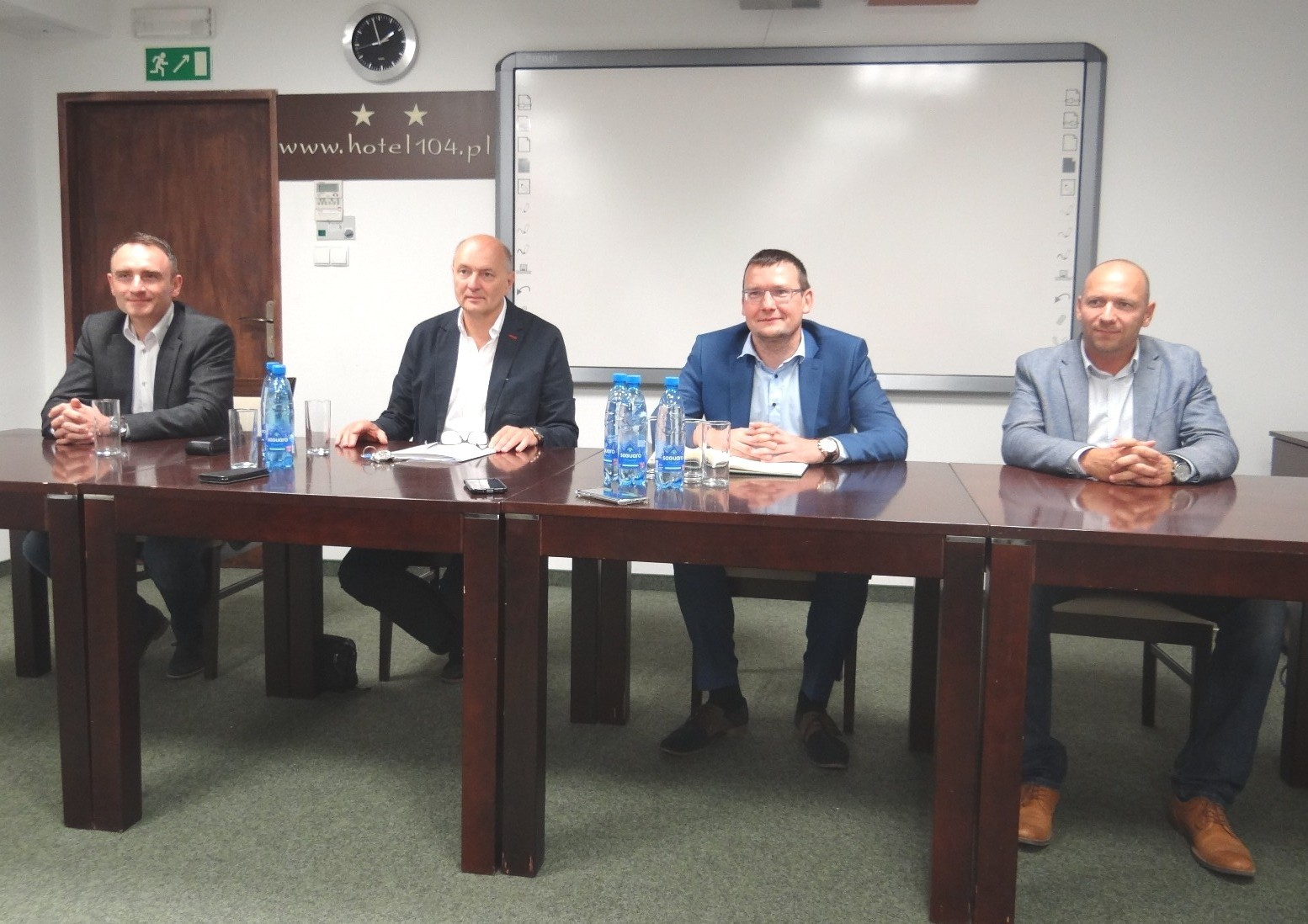 Konferencja prasowa po rejestracji spółki